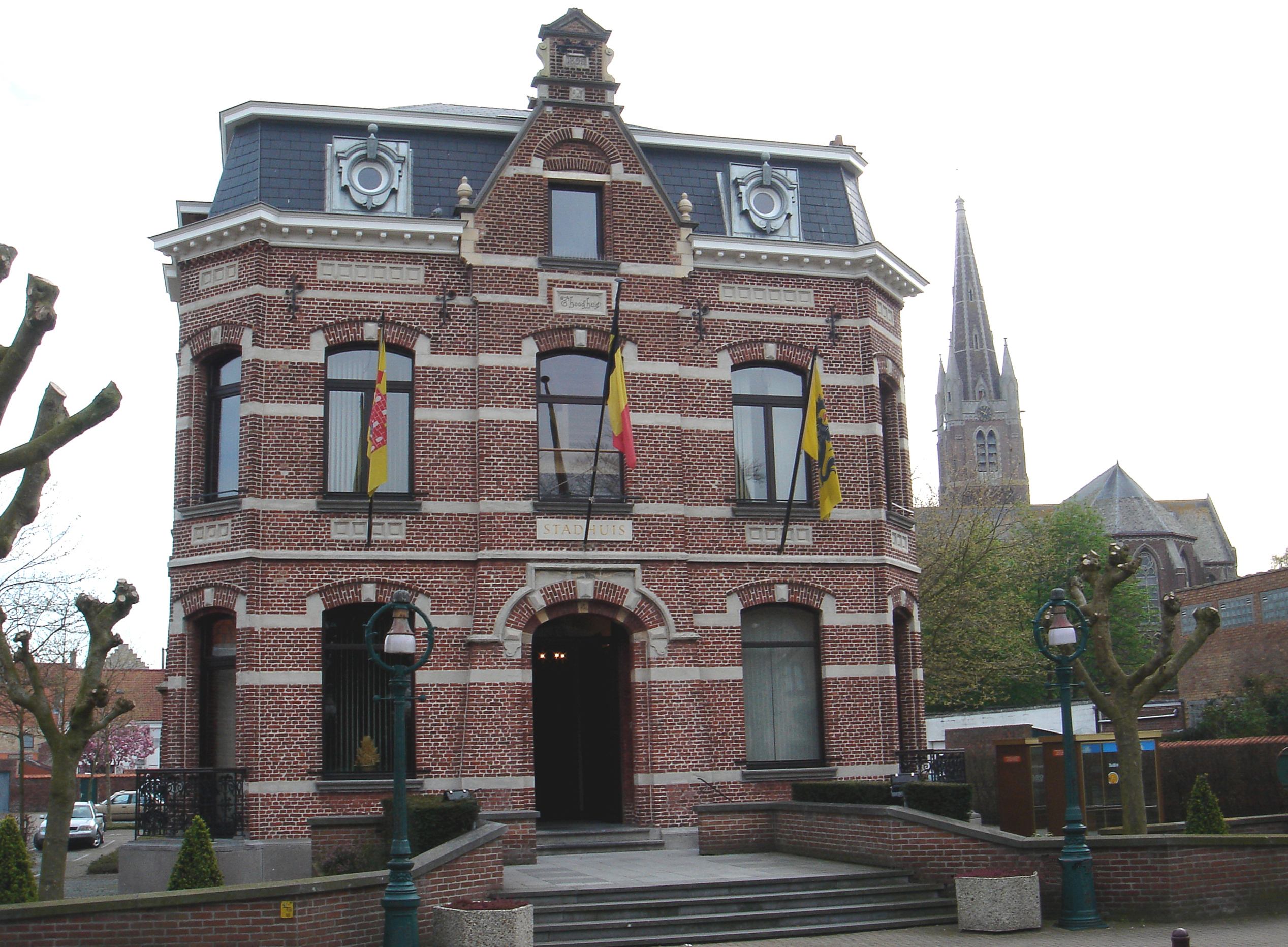 Rathaus von Oudenburg, Flandern, Belgien.